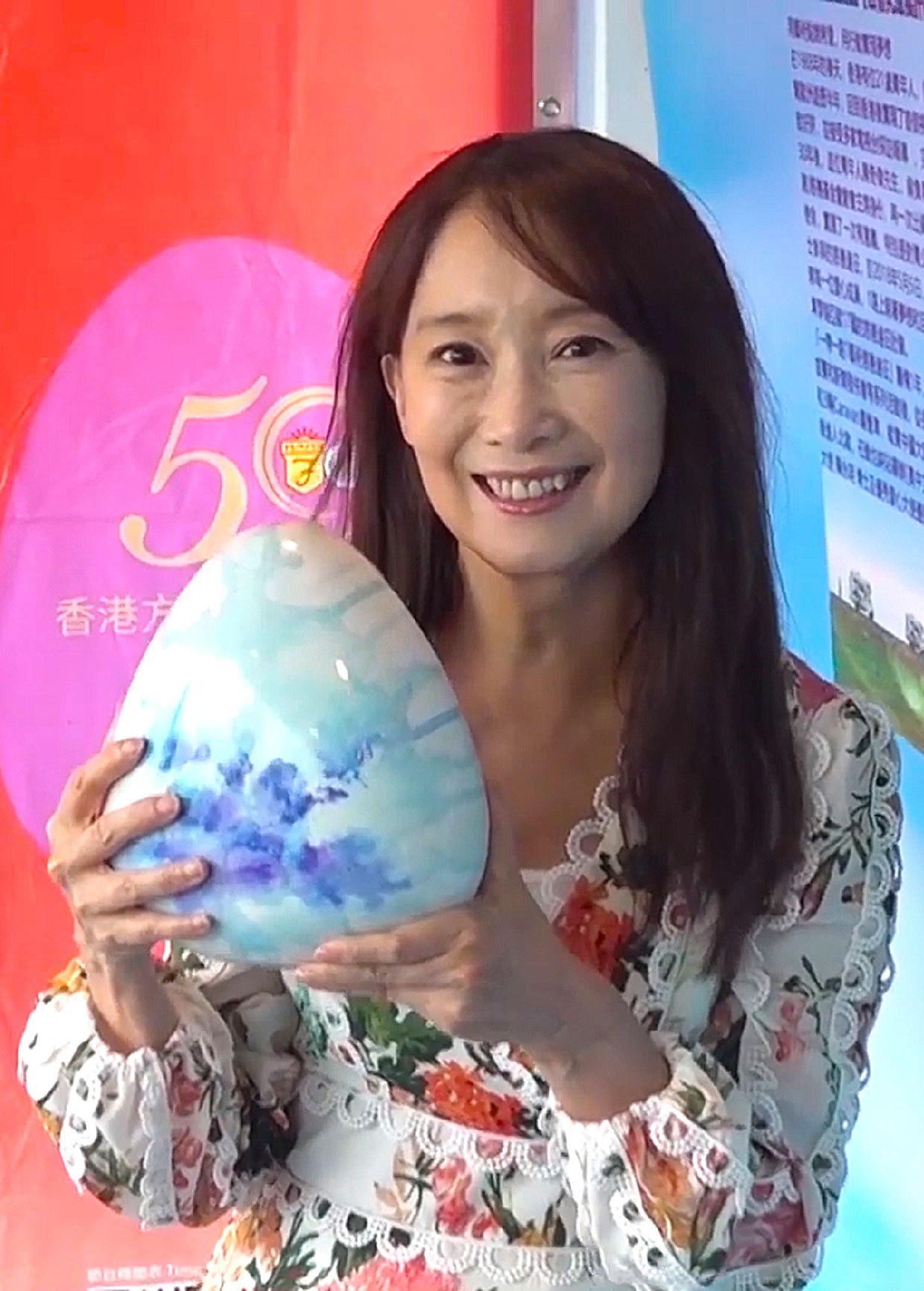 中文（香港）: 陳美齡